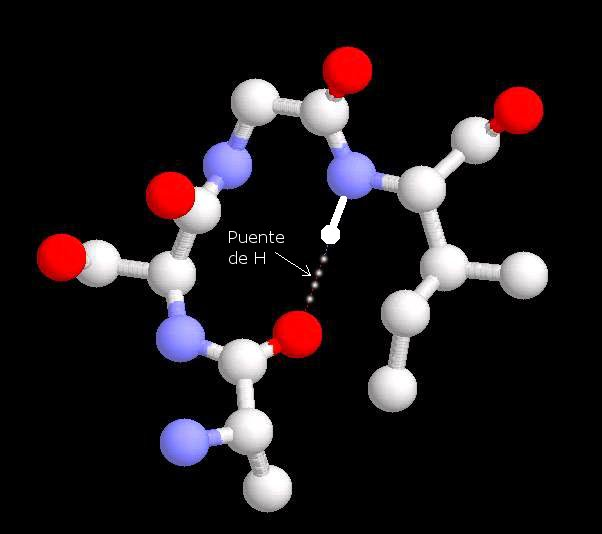 Estructura secundaria de las proteínas. Codo beta.